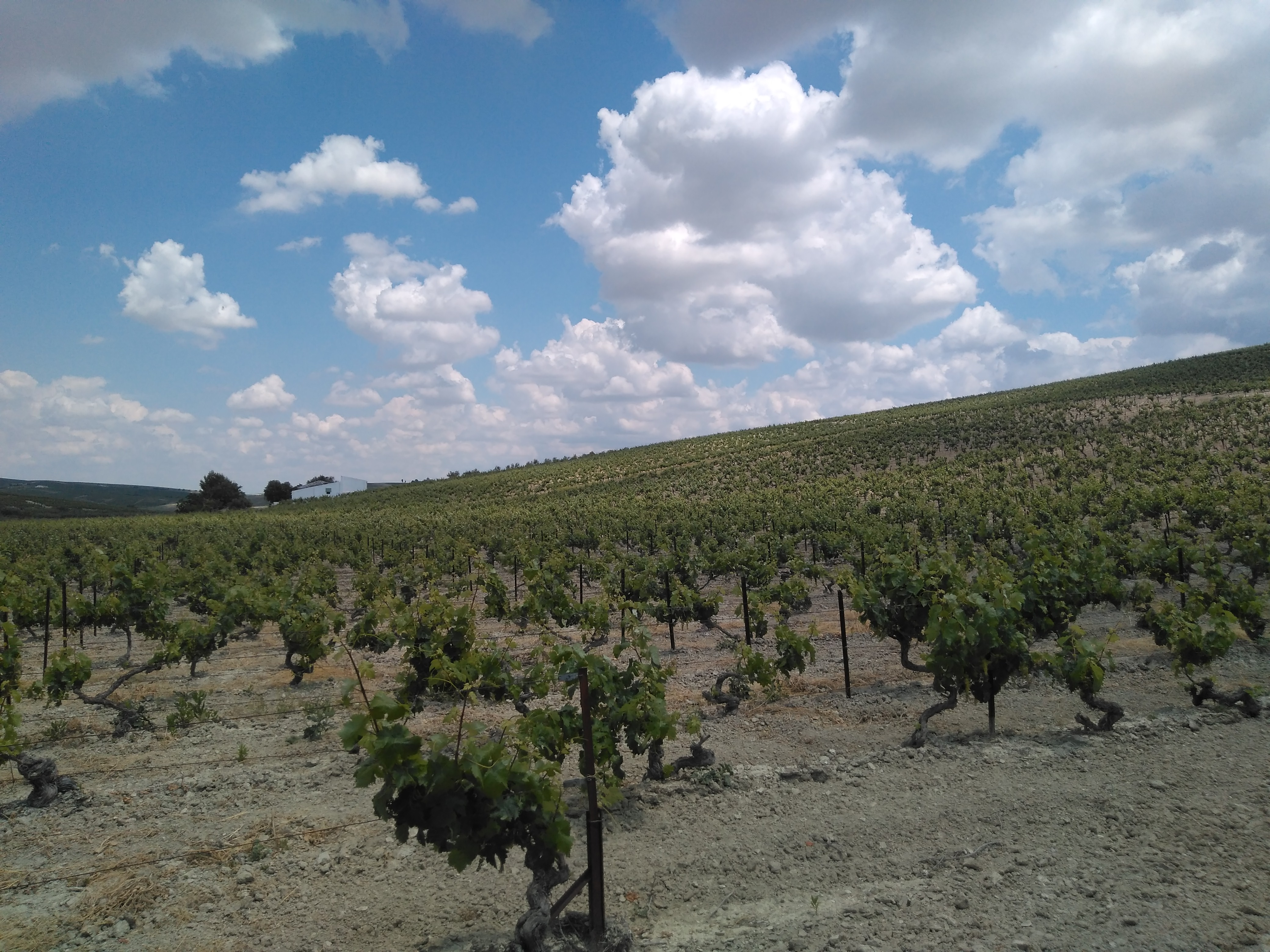 Viñedos junto a Viña Solana Chica (Jerez de la Frontera)